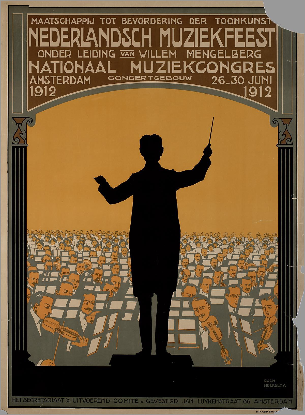 Affiche: Nederlandsch Muziekfeest onder leiding van Willem Mengelberg. Nationaal Muziekcongres Amsterdam, Concertgebouw, 26-30 juni 1912